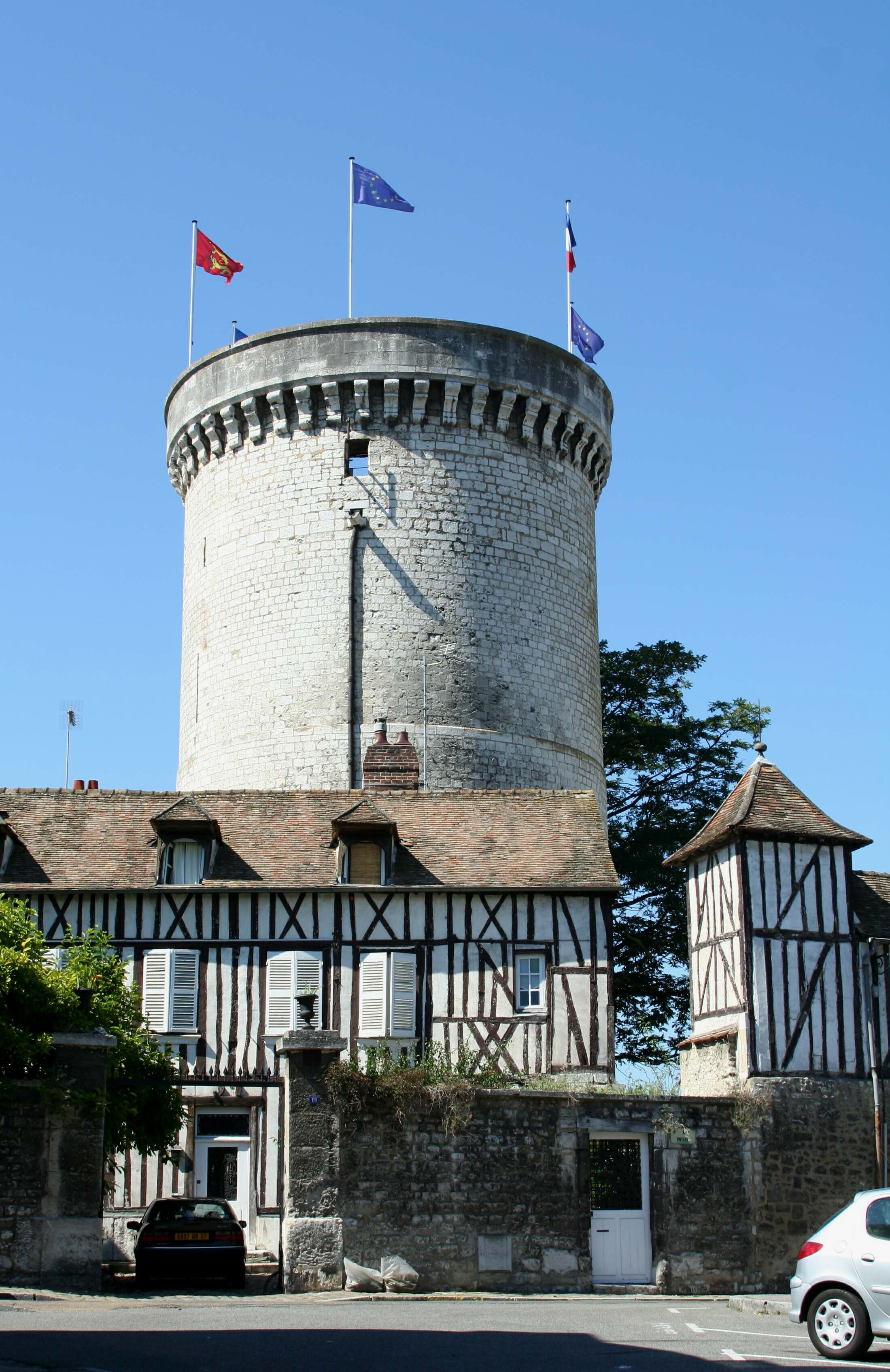 Tour des Archives à Vernon, Eure (France)